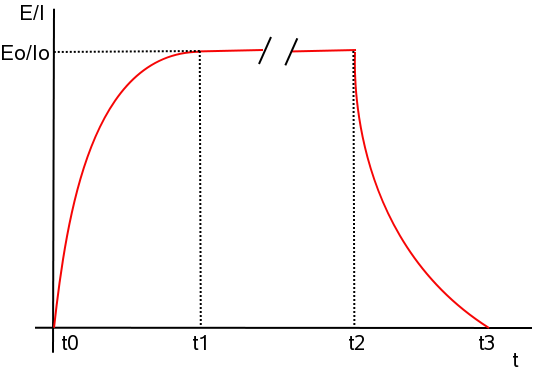 Régimen transitorio en circuitos serie RL y RC en CC (Serial RL and RC circuits in DC)